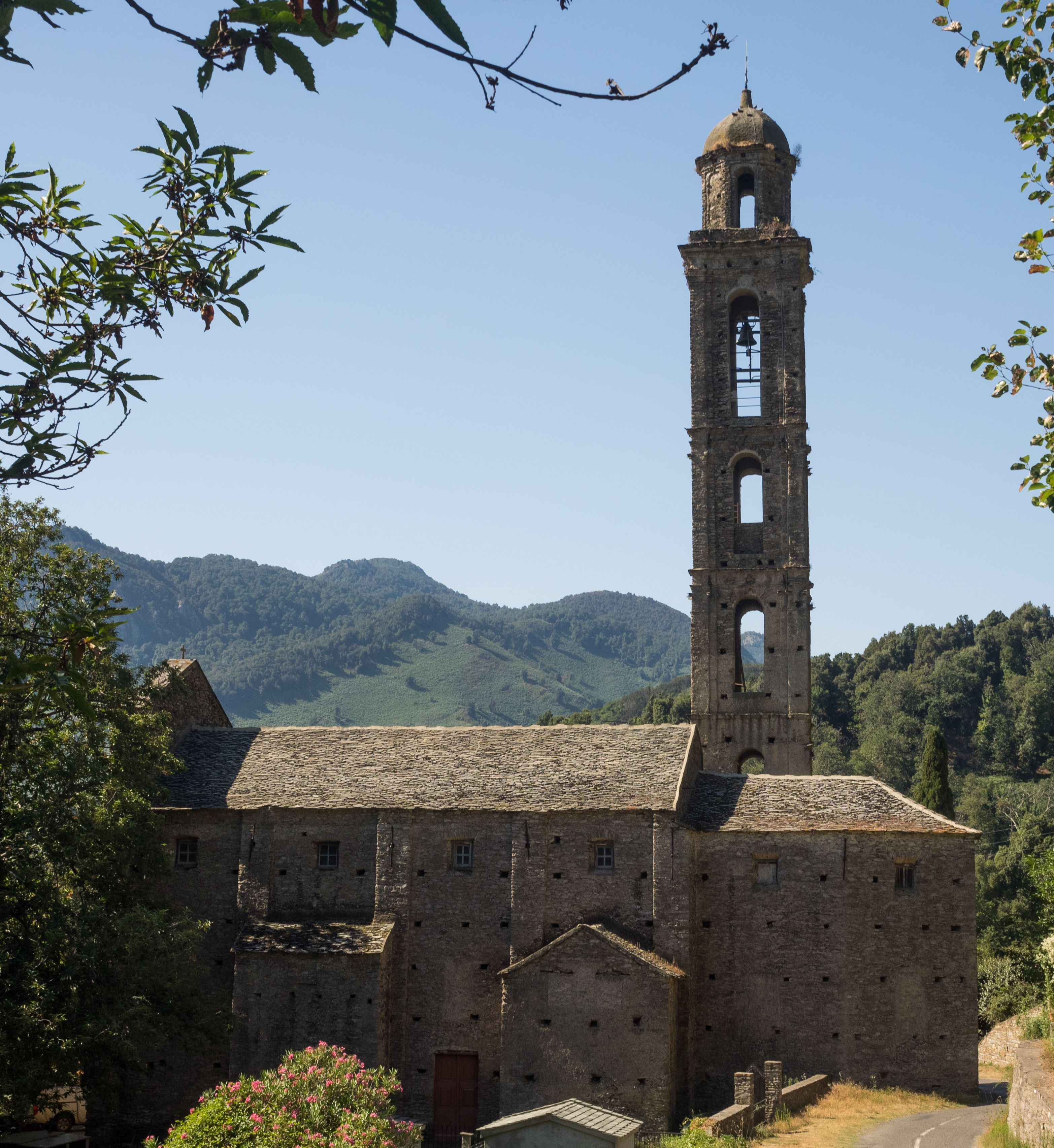 Eglise San Giovanni Moriani